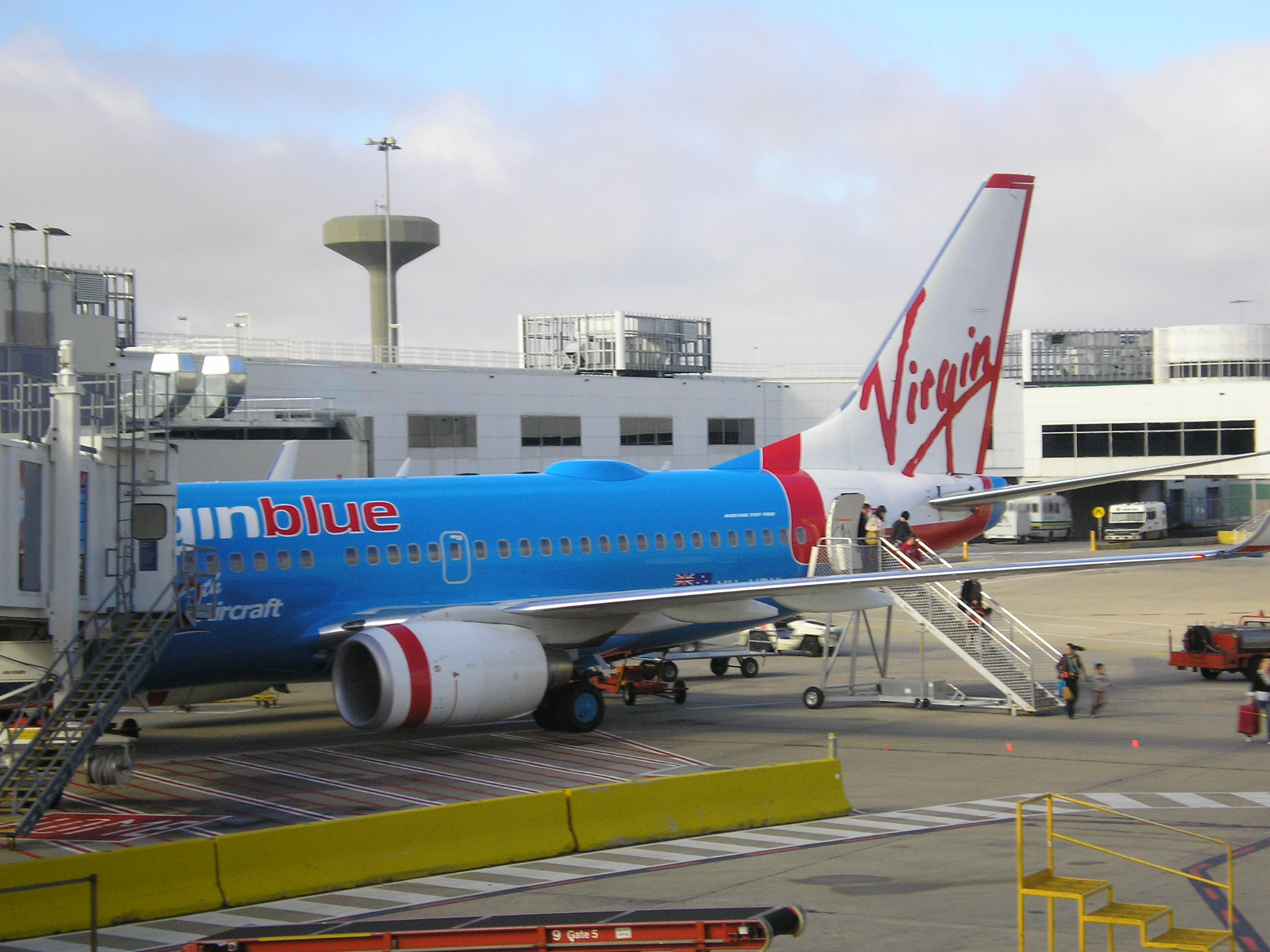 DJ308 from Brisbane to Melbourne operated on a Boeing 737-700 (VH-VBY) is seen docked into Terminal 3 Gate 2 unloading passengers and cargo. The aircraft is wearing the special livery marking 50 aircraft in the Virgin Blue fleet. Picture taken by me, JU580 on 10 July 2007